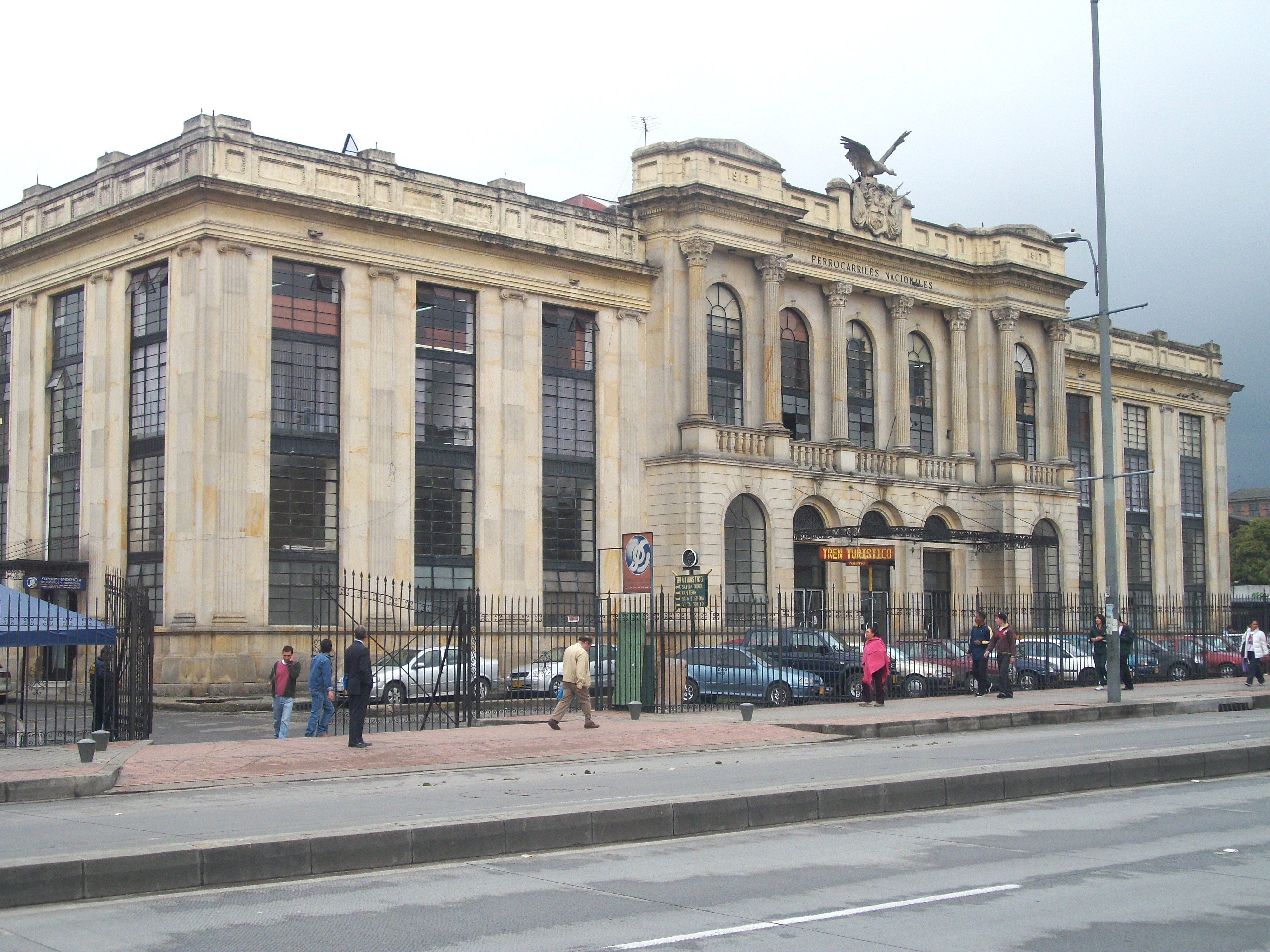 Estación de ferrocarril de La Sabana, Bogotá.